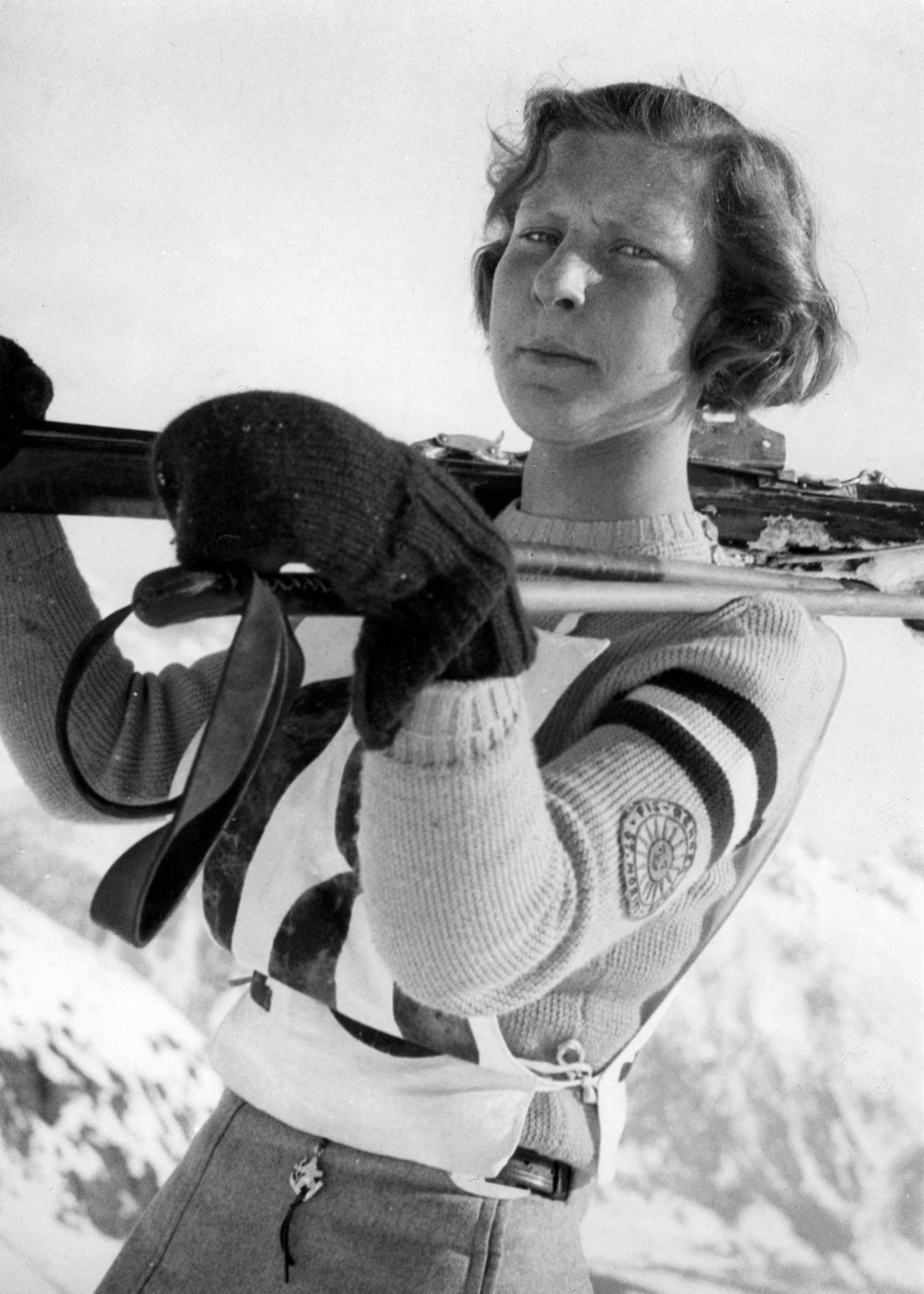 Barones Gratia v.d. Berg-Schimmelpenninck van der Oye, meervoudig Nederlands skikampioene, jaren '30.